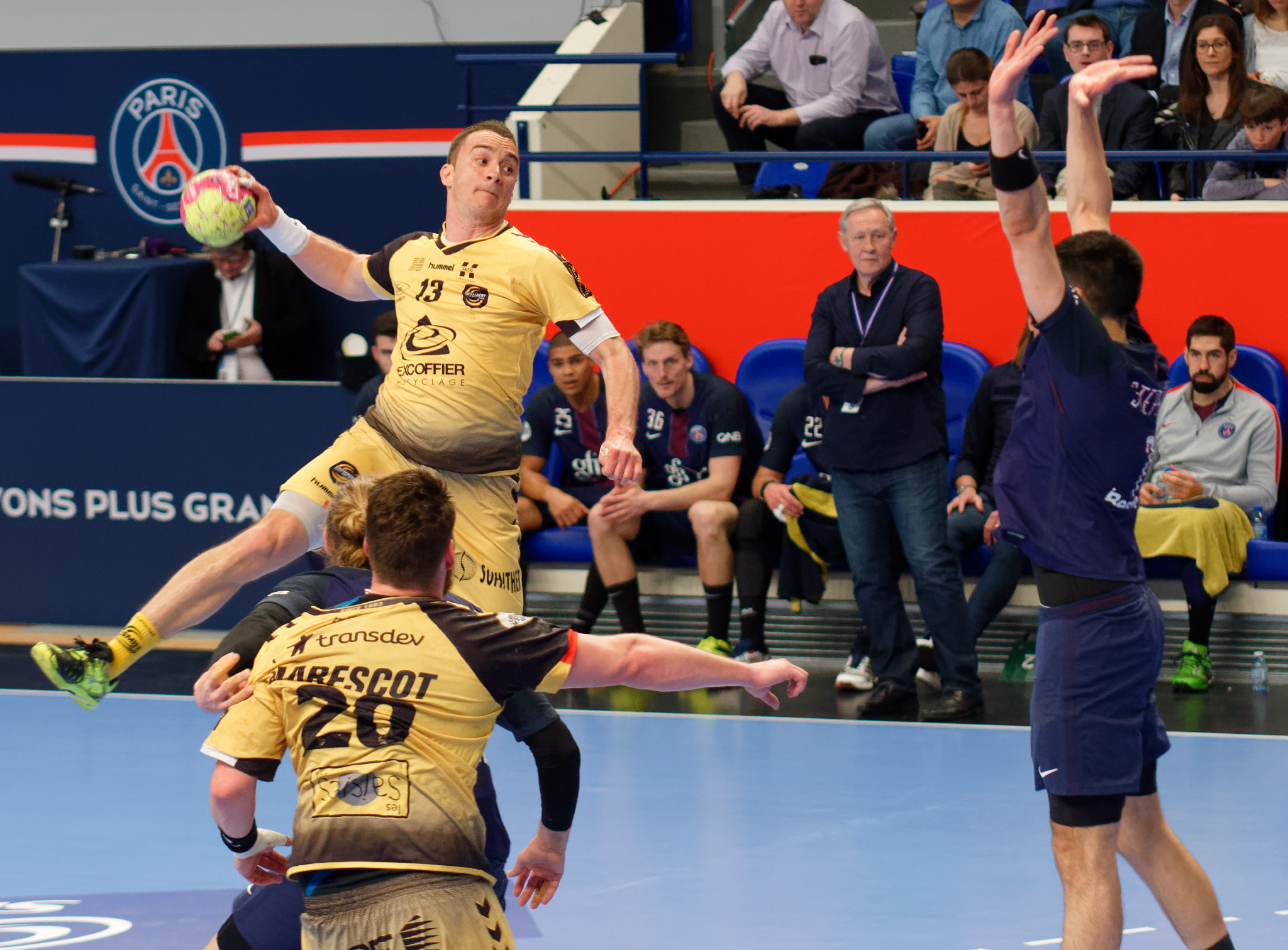 Rencontre de championnat de LidlStarLigue entre le PSG et chambéry. A coubertin, le 15 mars 2017.